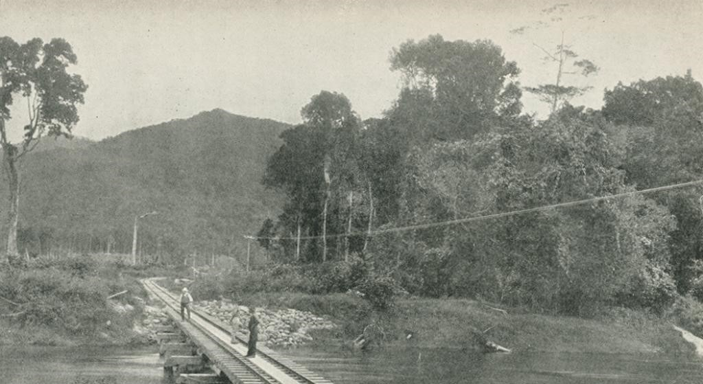 Railway bridge over Babinda Creek on the Cairns-Mulgrave Line. The range in the background is Bellenden-Ker